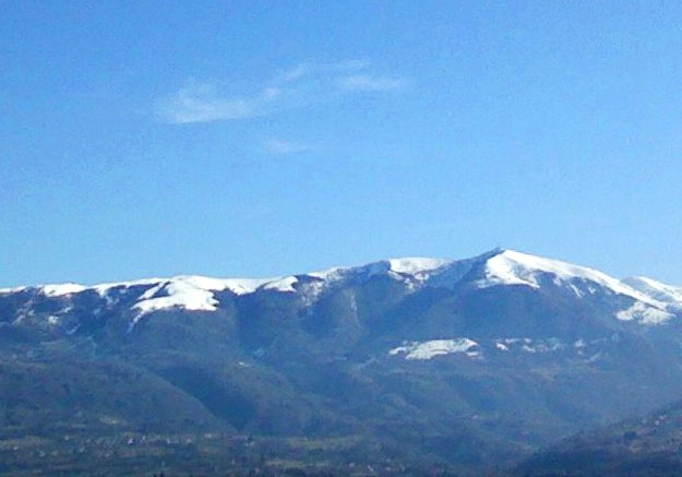 Foto scattata da Armandoria